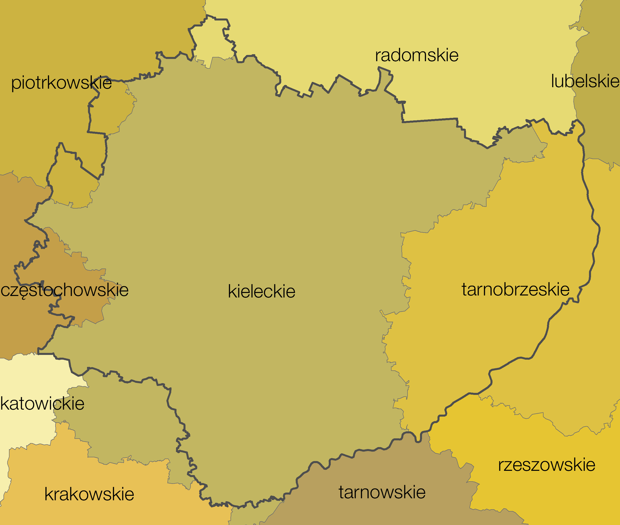 Województwo świętokrzyskie (od 1999) jako powstałe z województw podziału administracyjnego Polski z lat 1975-1998